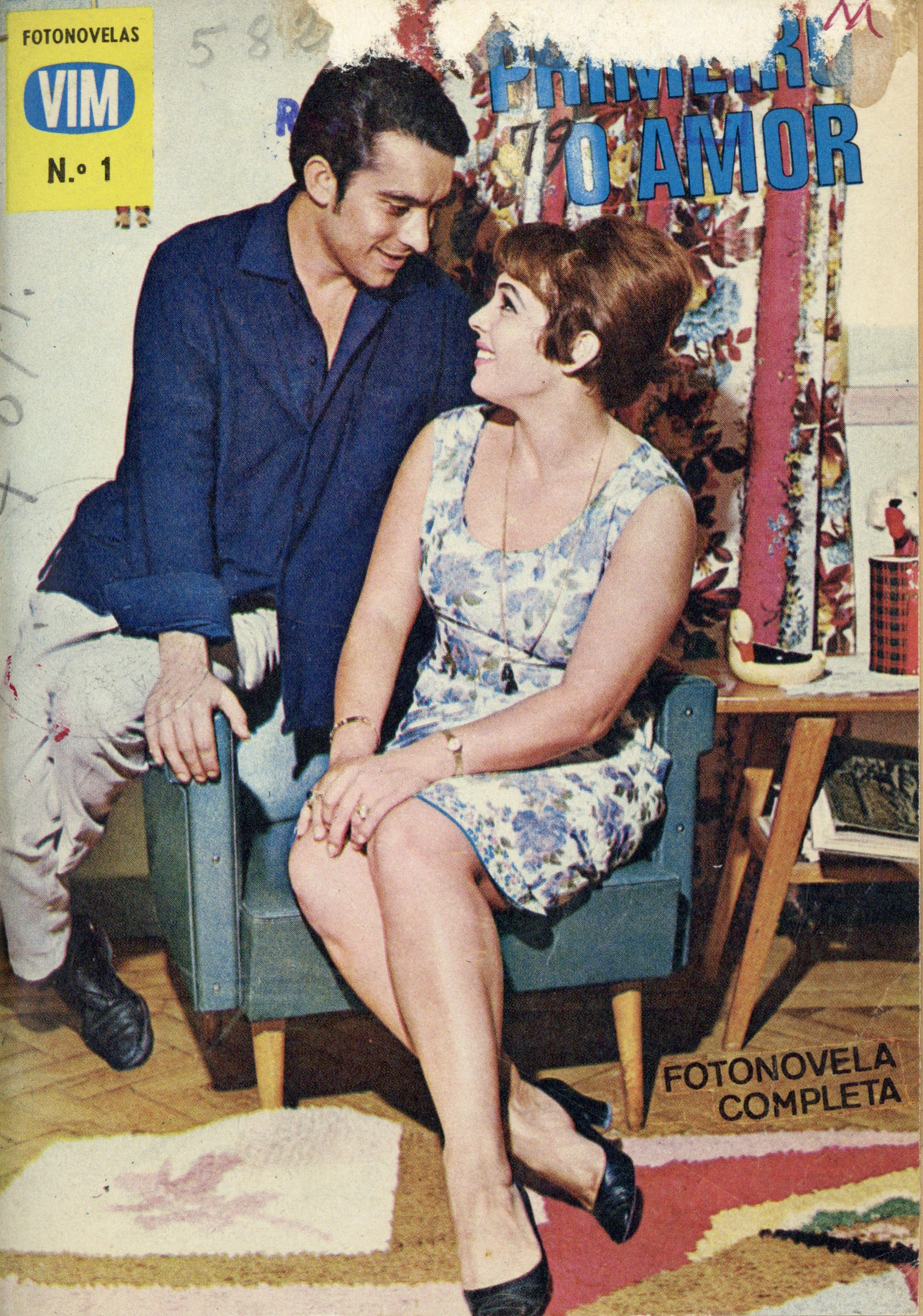 Agência Portuguesa de Revistas